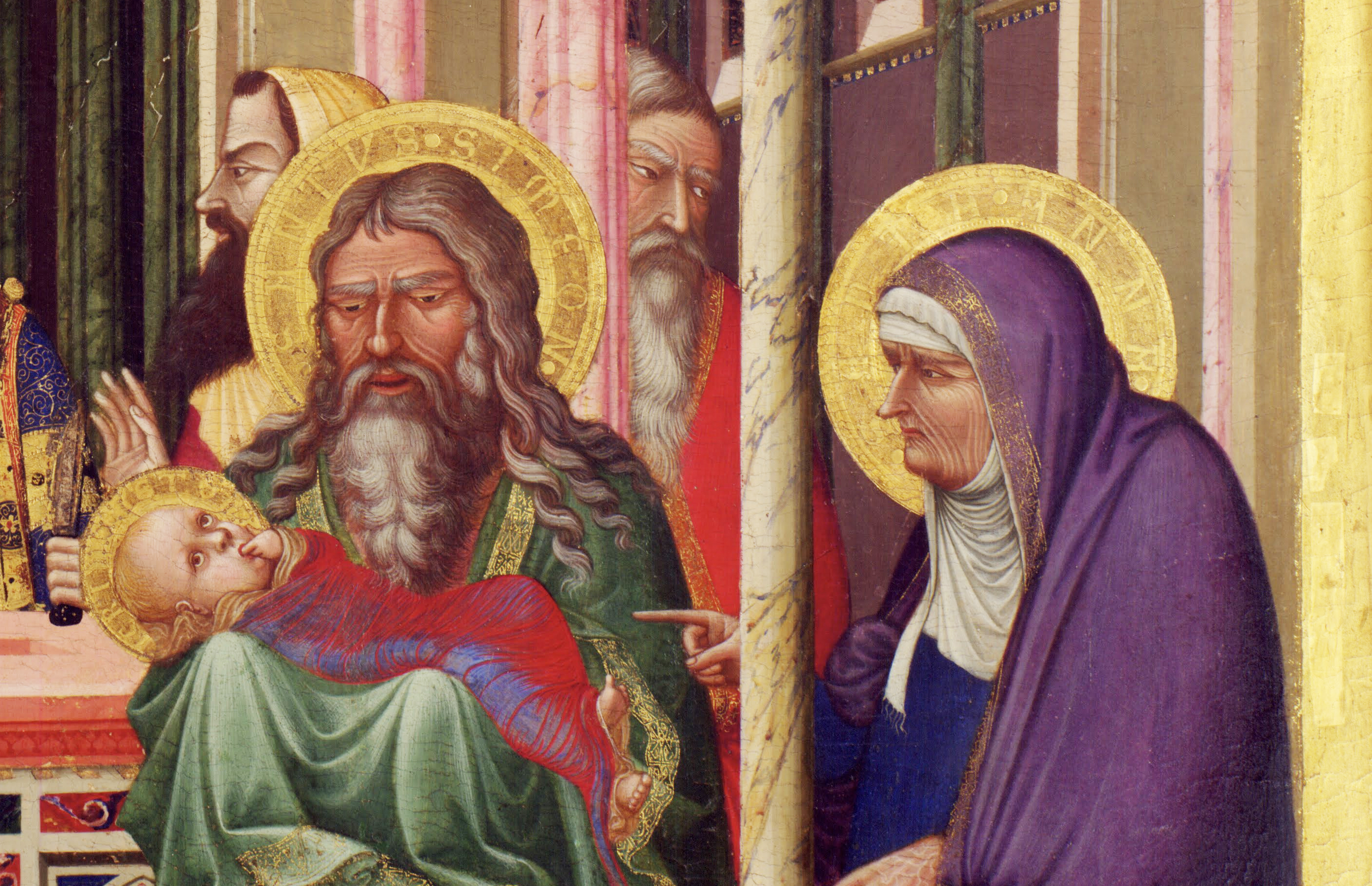 Lorenzetti_Amb.presentation_detail.jpg